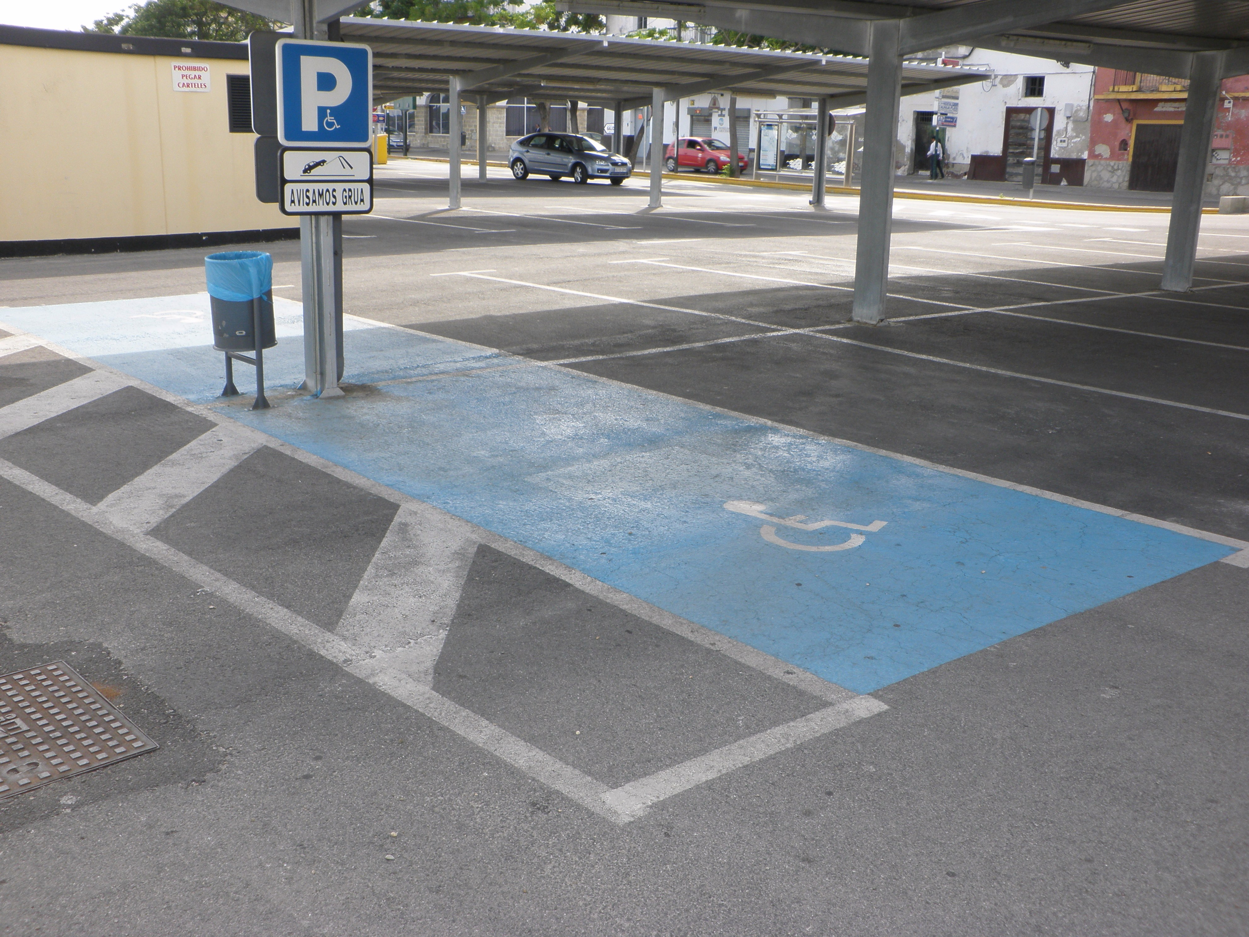 Aparcamiento para discapacitados en El Puerto de Santa María, Cádiz.